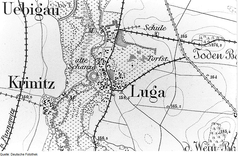 Original image description from the Deutsche Fotothek Neschwitz-Luga. Meßtischblatt, Sekt. Luttowitz, 1884